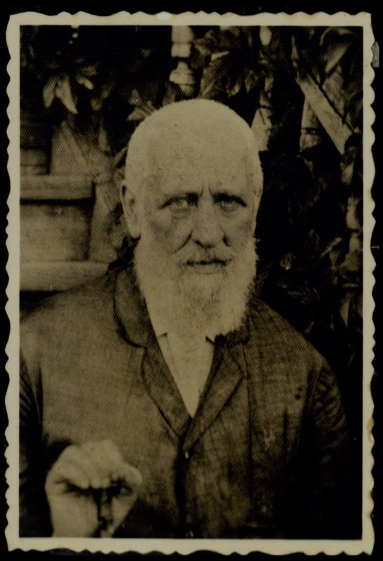 רפרודוקציה מתצלום דיוקנו של חנינא ליפא רבינוביץ': הדפס כסף, שחור לבן, 5.5X8 ס"מ. רפרודוקציה זו נתרמה לאוסף שבדרון שבספריה הלאומית בשנת 1938 על ידי נכדתו של רבינוביץ', גב' ר. גרוסמן, חיפה, ויש לשער כי היא הופקה סמוך לאותו זמן. כפי הנראה, הדיוקן המקורי צולם בסוף המאה התשע עשרה.